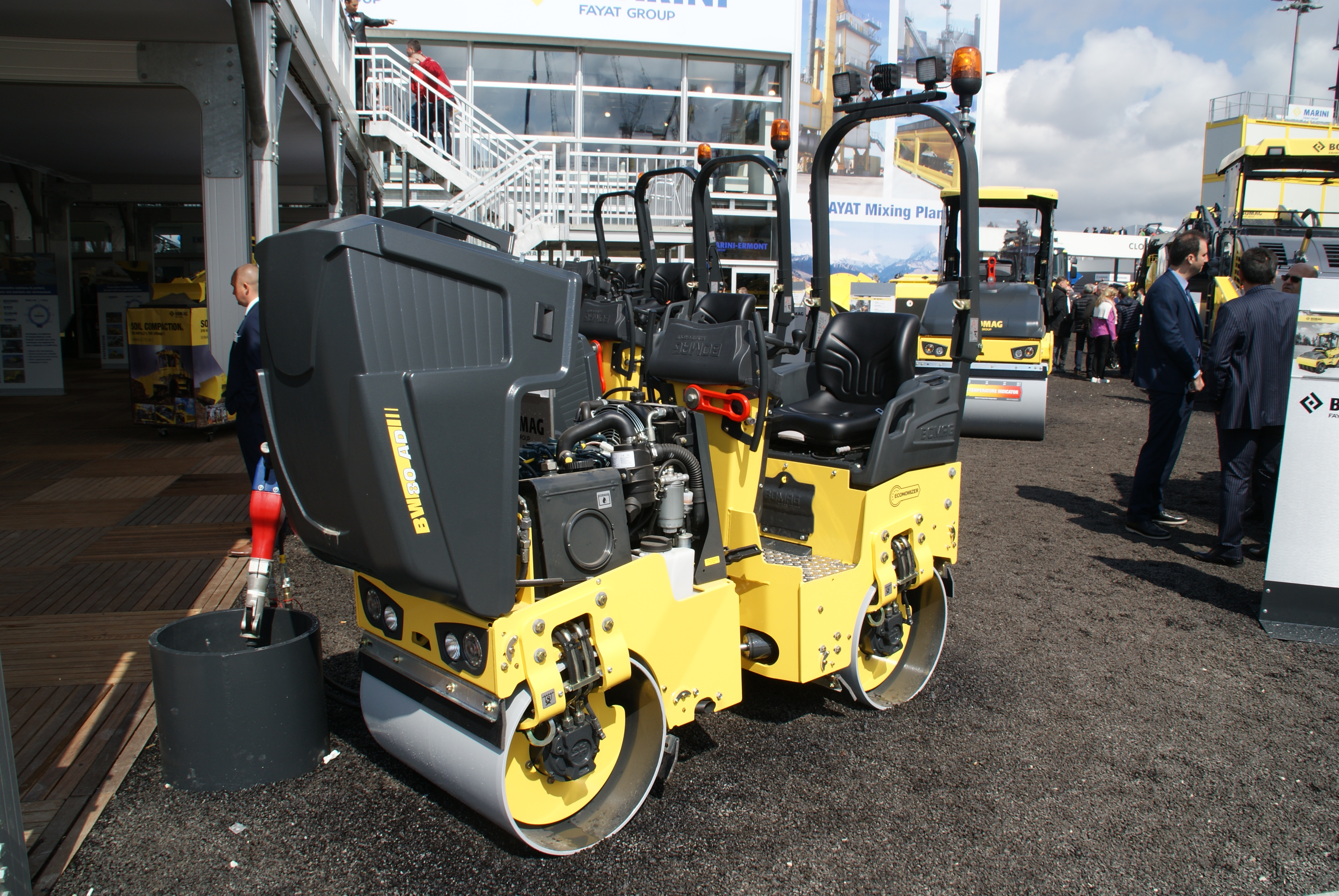 Tandemvibrationswalze der Fa. BOMAG